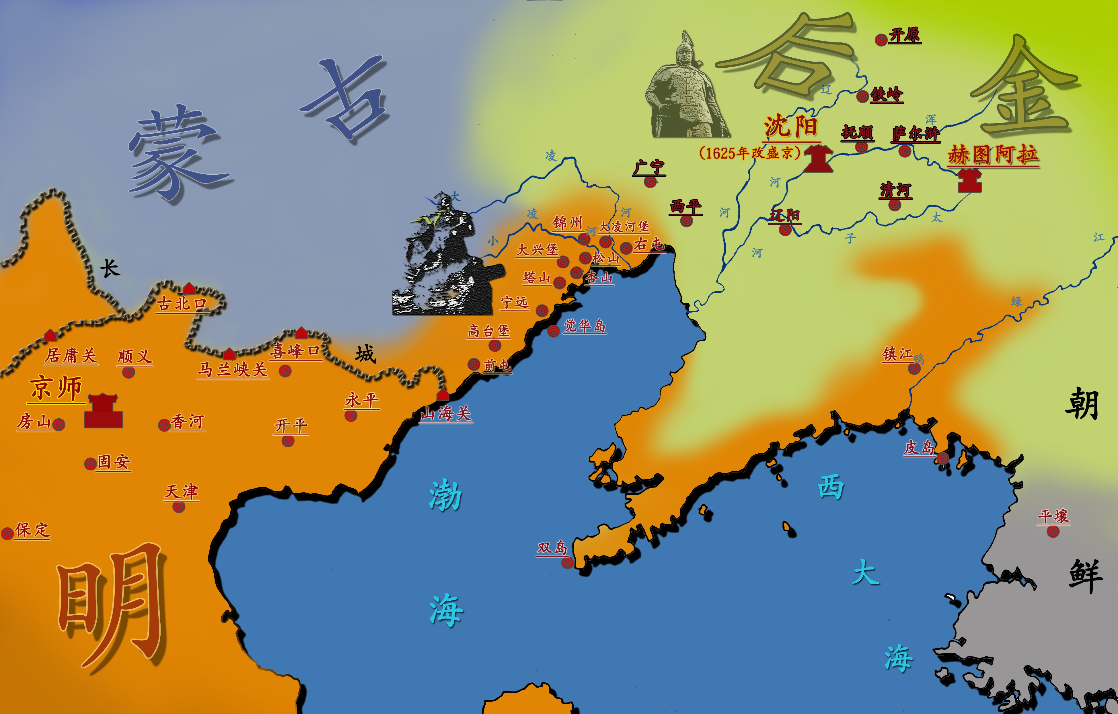 明亡清兴